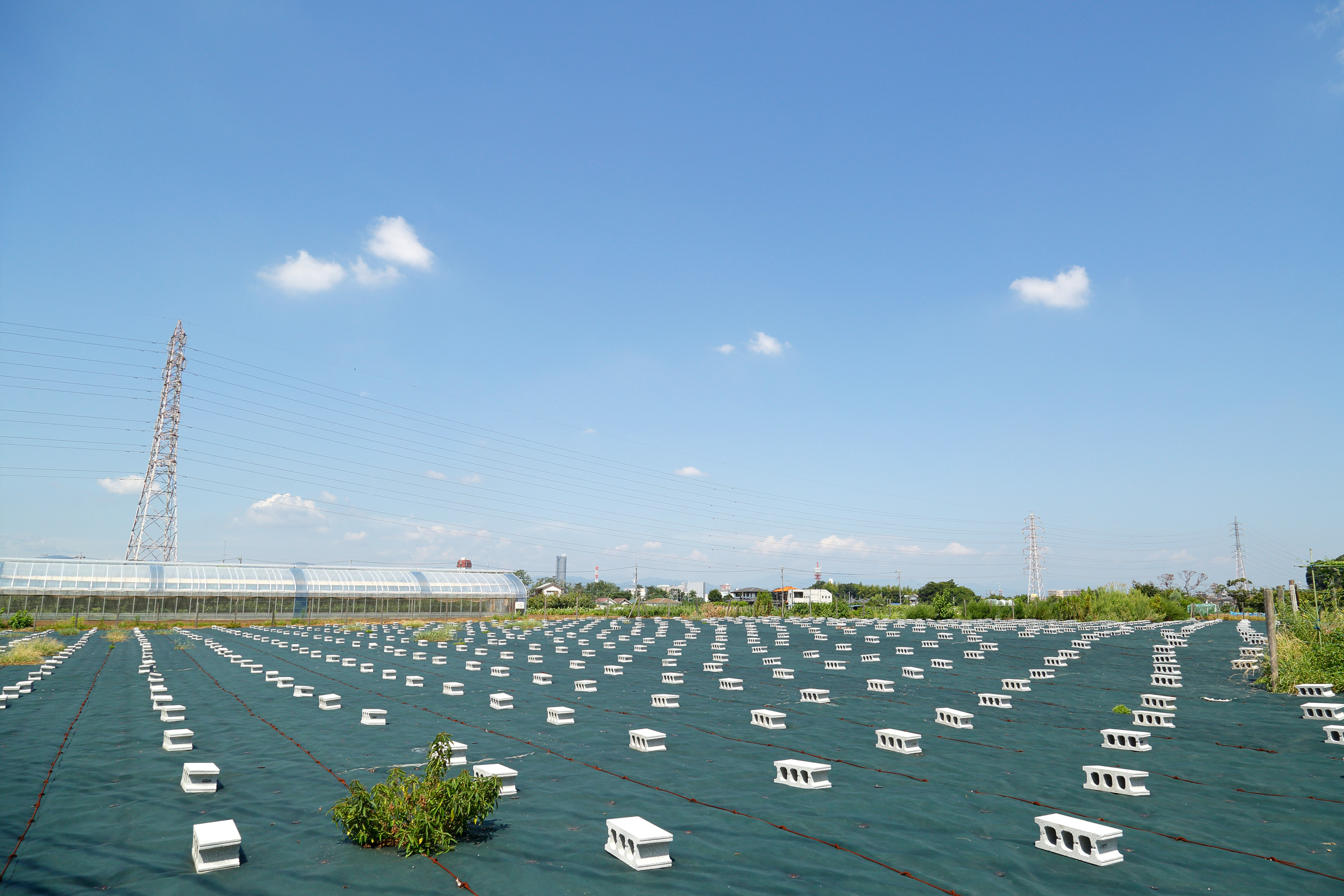 日野市西平山のja:日野バイパス延伸部関連と思われる空地。コンクリートブロックを載せたシートで覆われている。